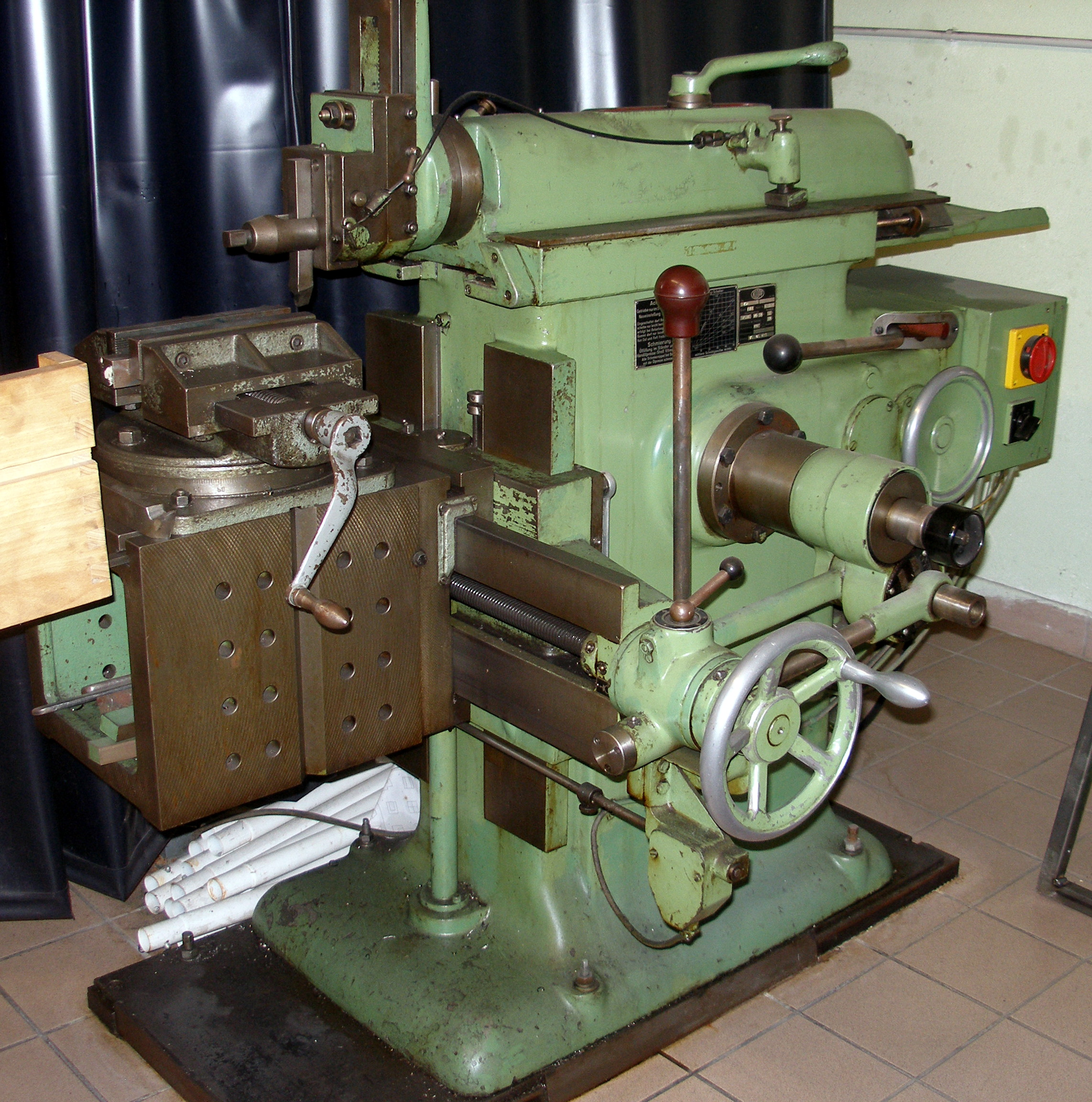 Stoßmaschine horizontal